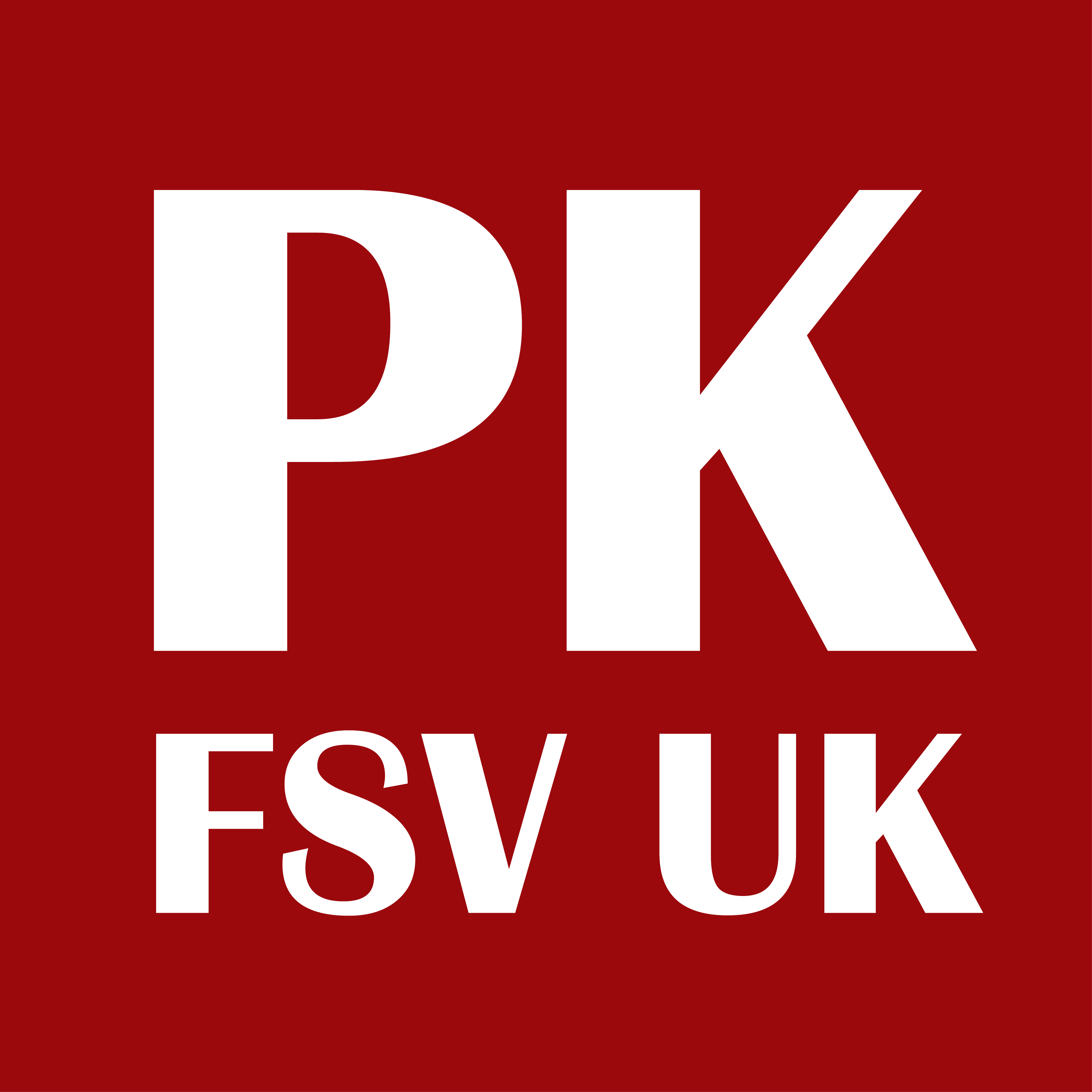 Logo Politologického klubu FSV UK